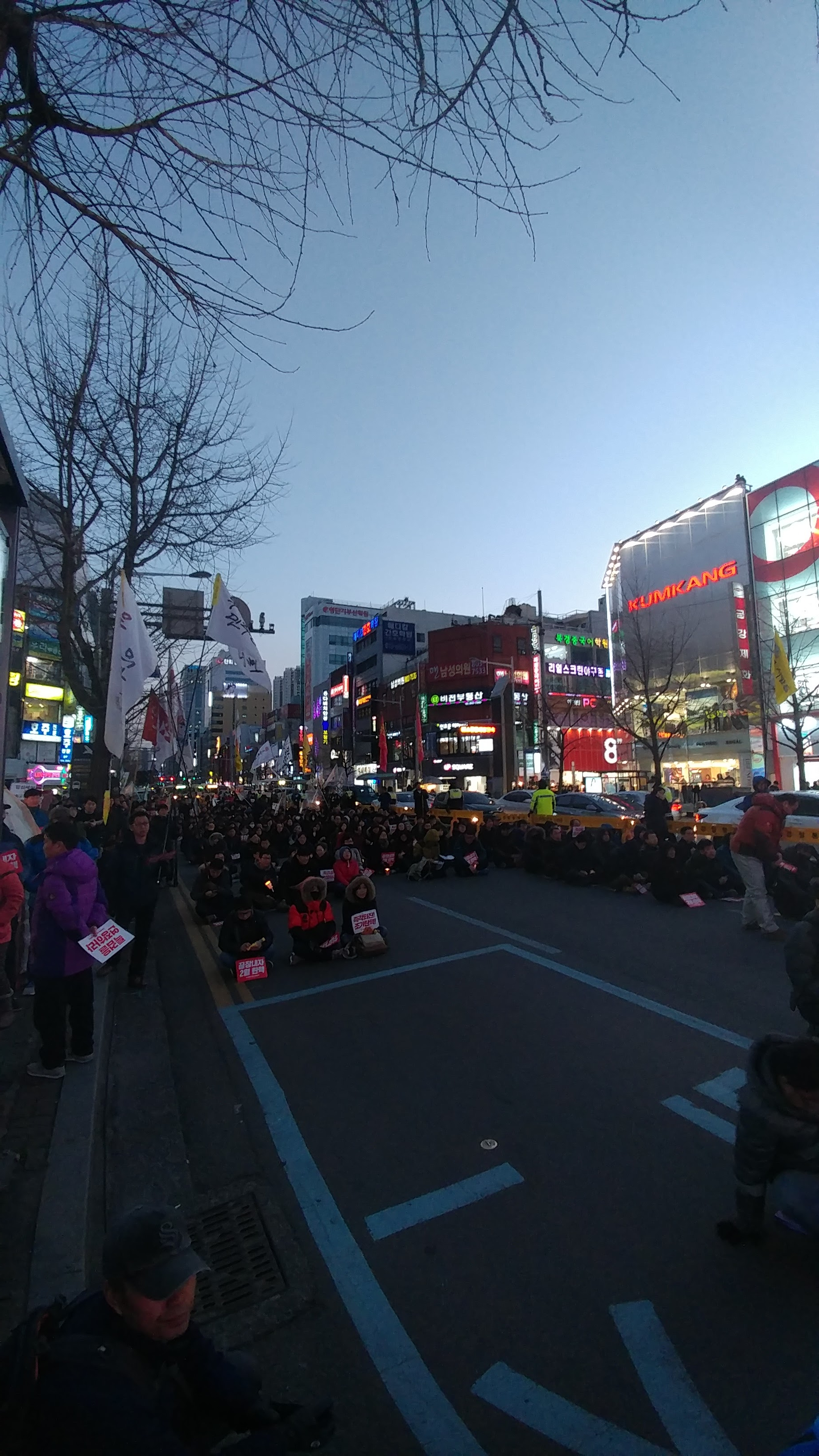 17년 2월 18일, 부산 서면에서 열린 박근혜 탄핵 요구 집회